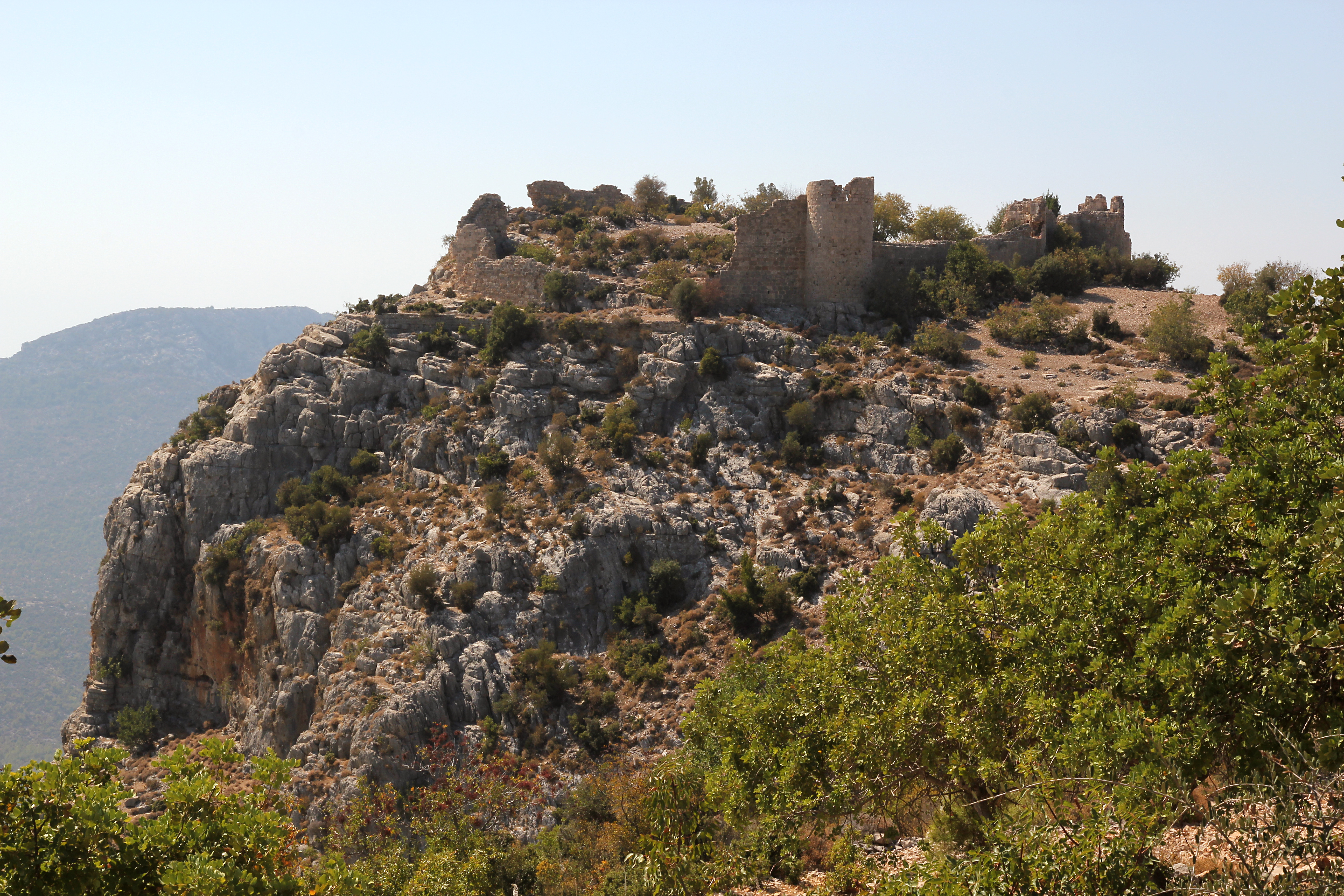 Tokmar Kalesi, Kreuzritterburg westlich Silifke in der Südtürkei